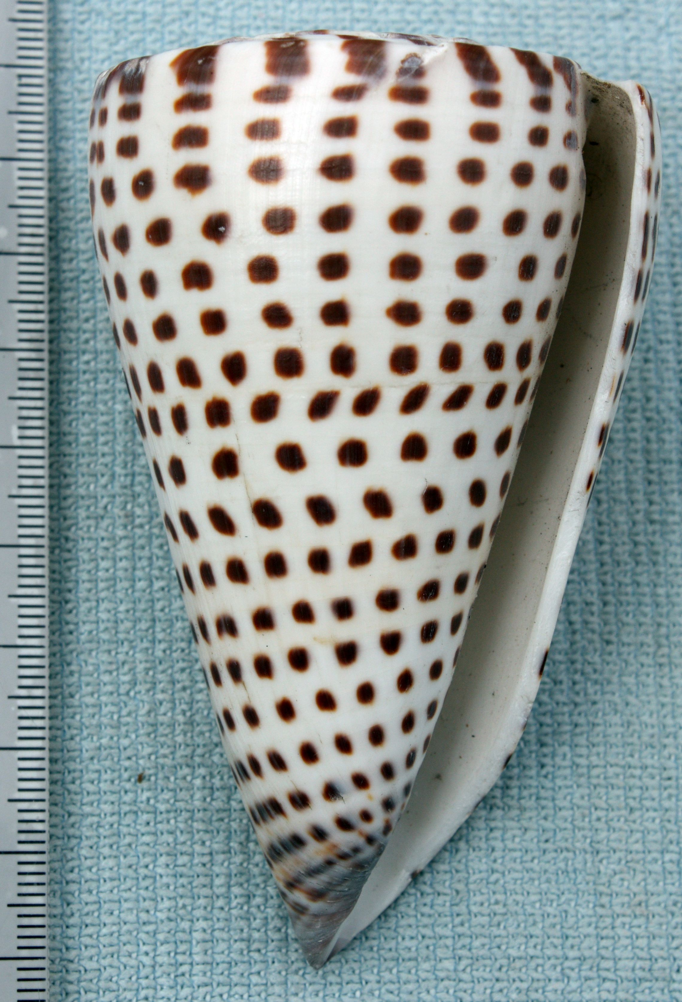 Bokstavkonus Conus litteratus er en rask rovsnegl som skyter svært giftige piler med tungen og så drar byttet inn. Munnen er nederst på bildet.Navnet kommer av at de mørke flekkene kan minne om bokstaver. Template:Byline